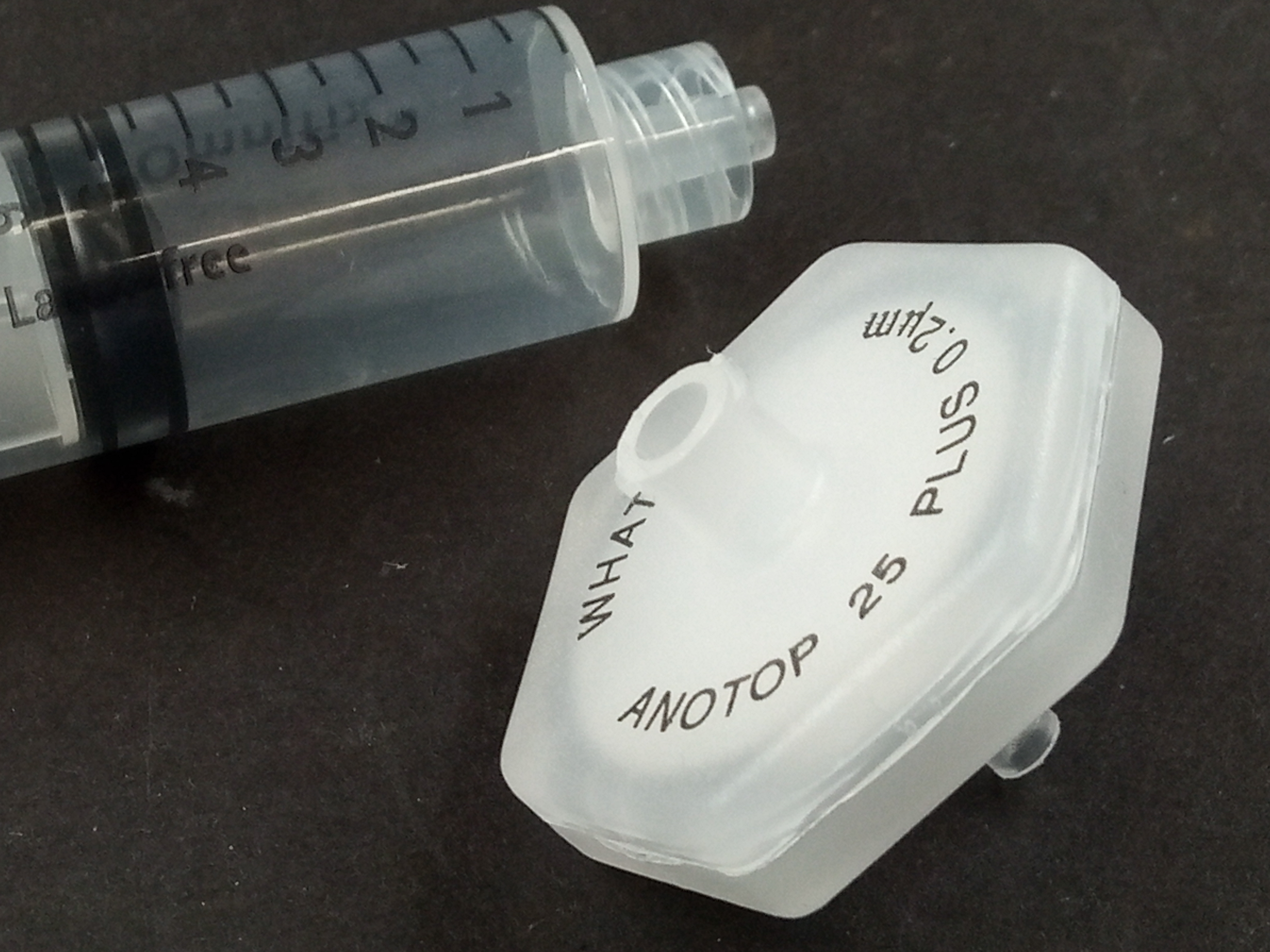 Spritzenfilter 0,2µm mit Einwegspritze